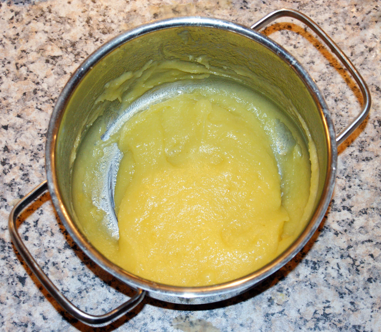 Mousselinescrème.